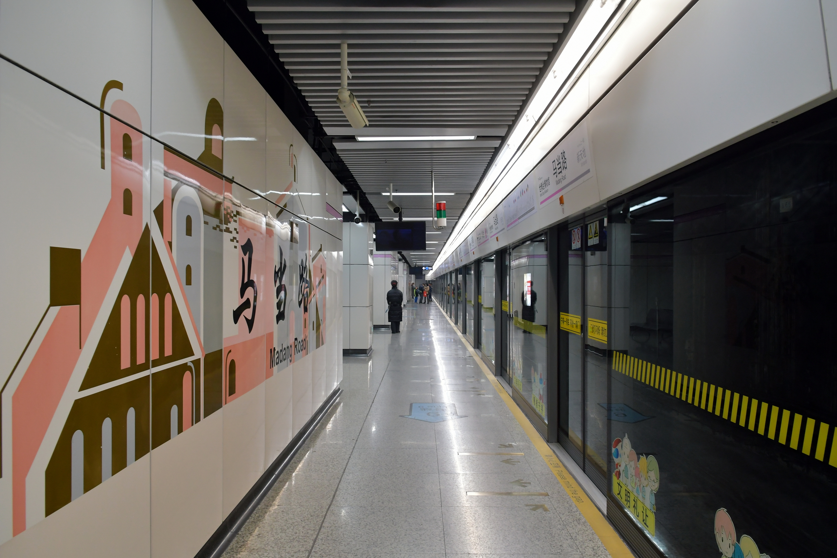 上海轨道交通13号线马当路站站台。